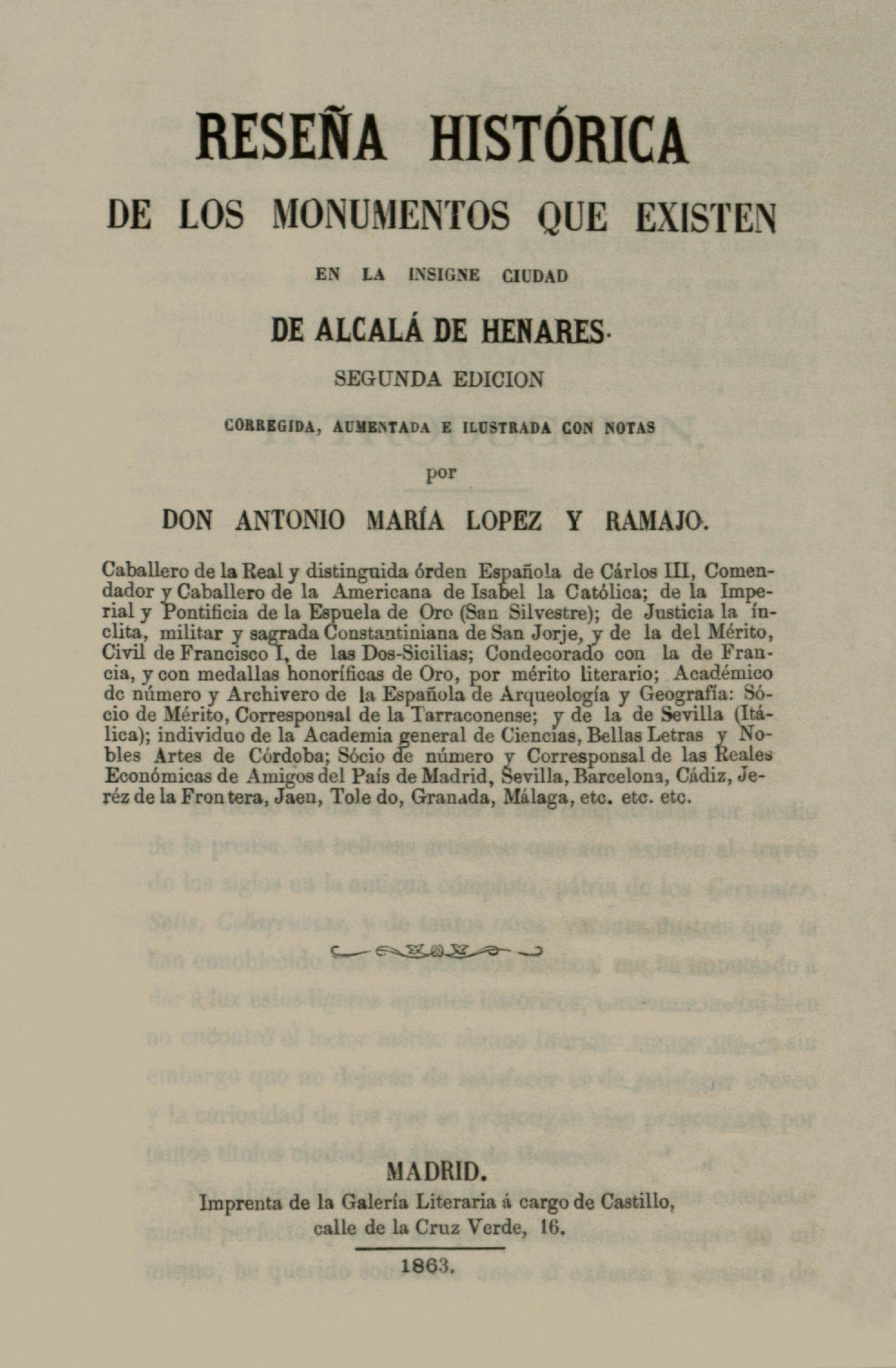 Portada del libro titulado "Reseña histórica de los monumentos que existen en la insigne ciudad de Alcalá de Henares", publicado por Antonio María López Ramajo en 1863.